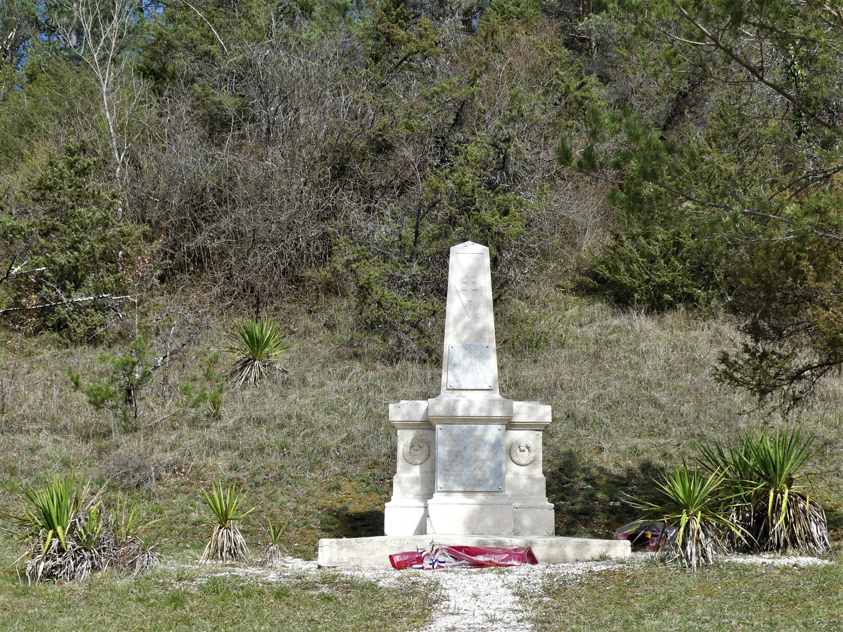 Stèle en bordure de la route départementale 710, près du lieu-dit les Potences, Sainte-Marie-de-Chignac, Dordogne, France. En mémoire des 23 otages fusillés par les Allemands le 27 mars 1944. Initialement, 5 d'entre eux étaient inconnus. En mars 2019, une nouvelle plaque a été apposée avec les 23 noms de personnes.